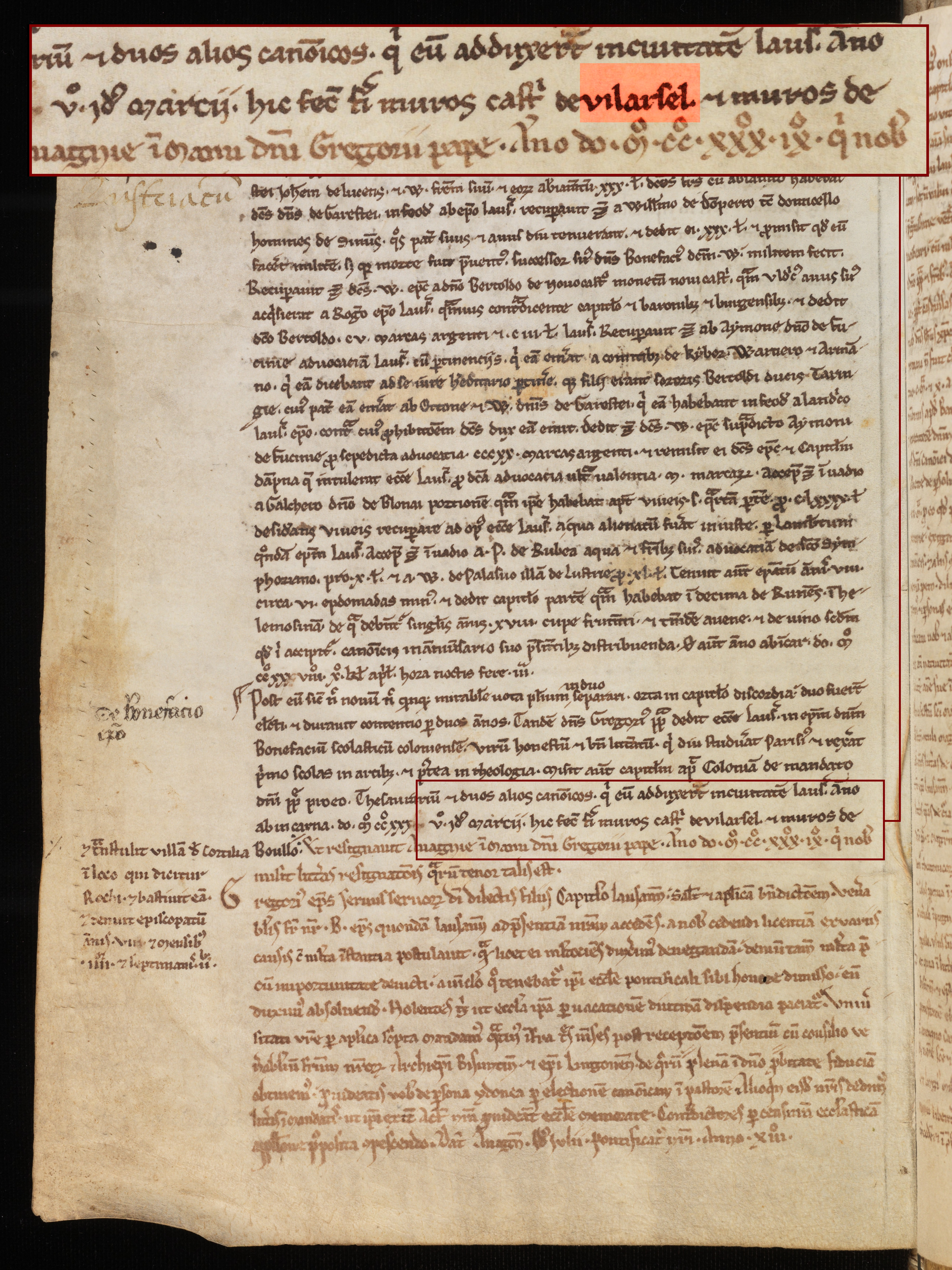 Mention d'un Château à Vilarsel fondé sur ordre de Berthold de Neuchâtel dans le Cartularium Lausannense, Berne, Burgerbibliothek, Cod. B 219, 8v